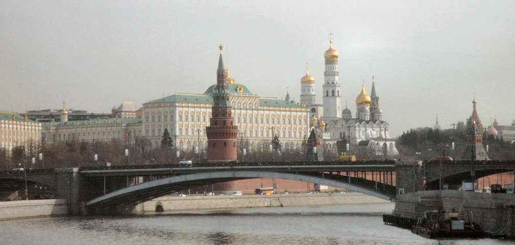 Kreml jenseits Moskwa, von Christ-Erlöser-Kathedrale aus fotografiert